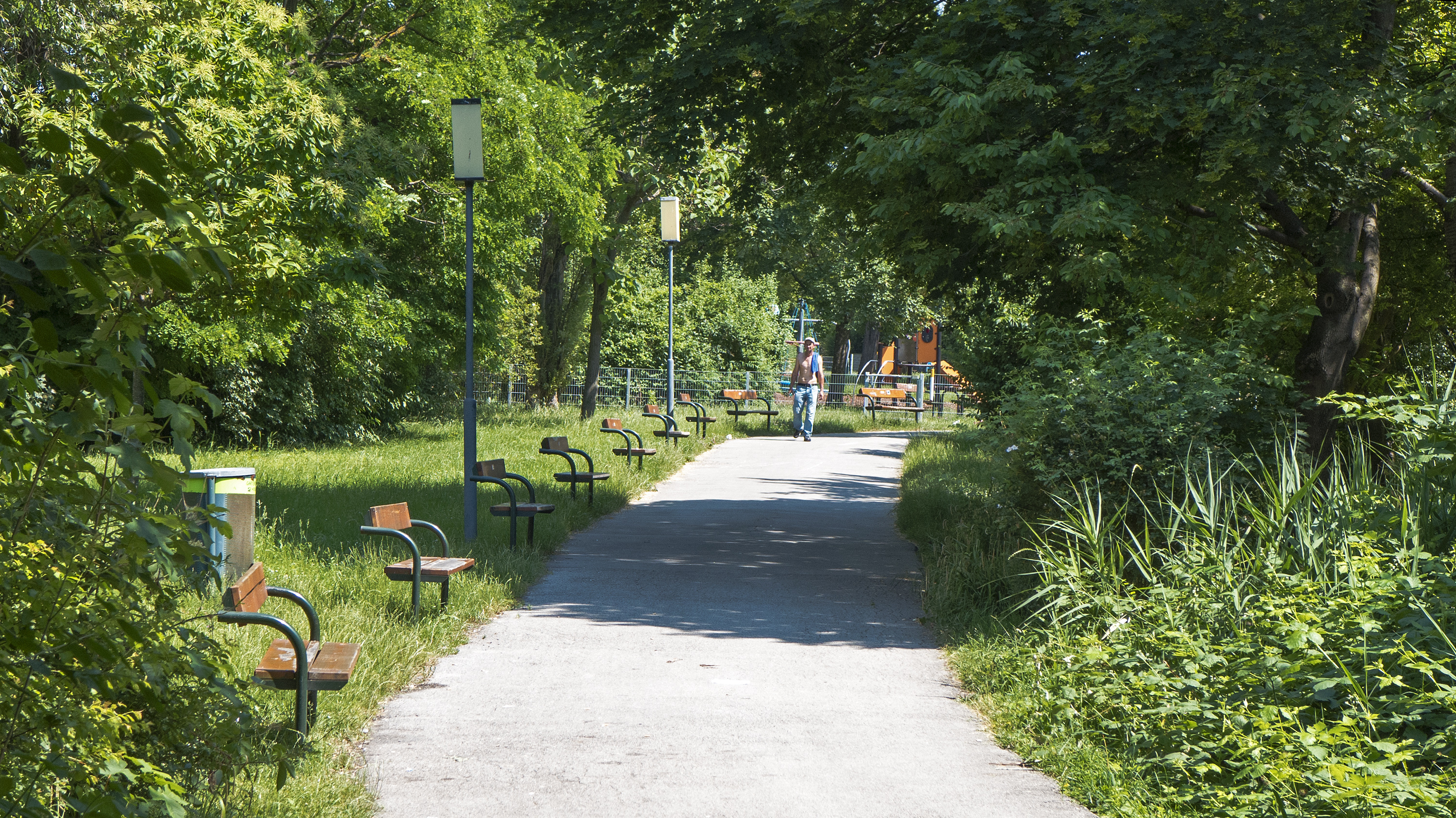 Otto-Benesch-Park in Wien 10